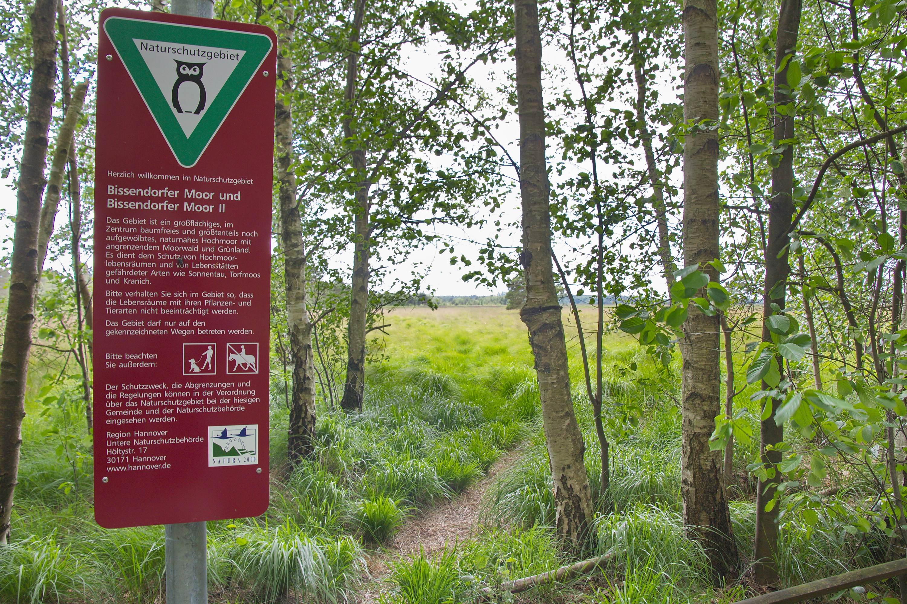 Hinweistafel im Bissendorfer Moor bei Wiechendorf (Wedemark), Niedersachsen, Deutschland.